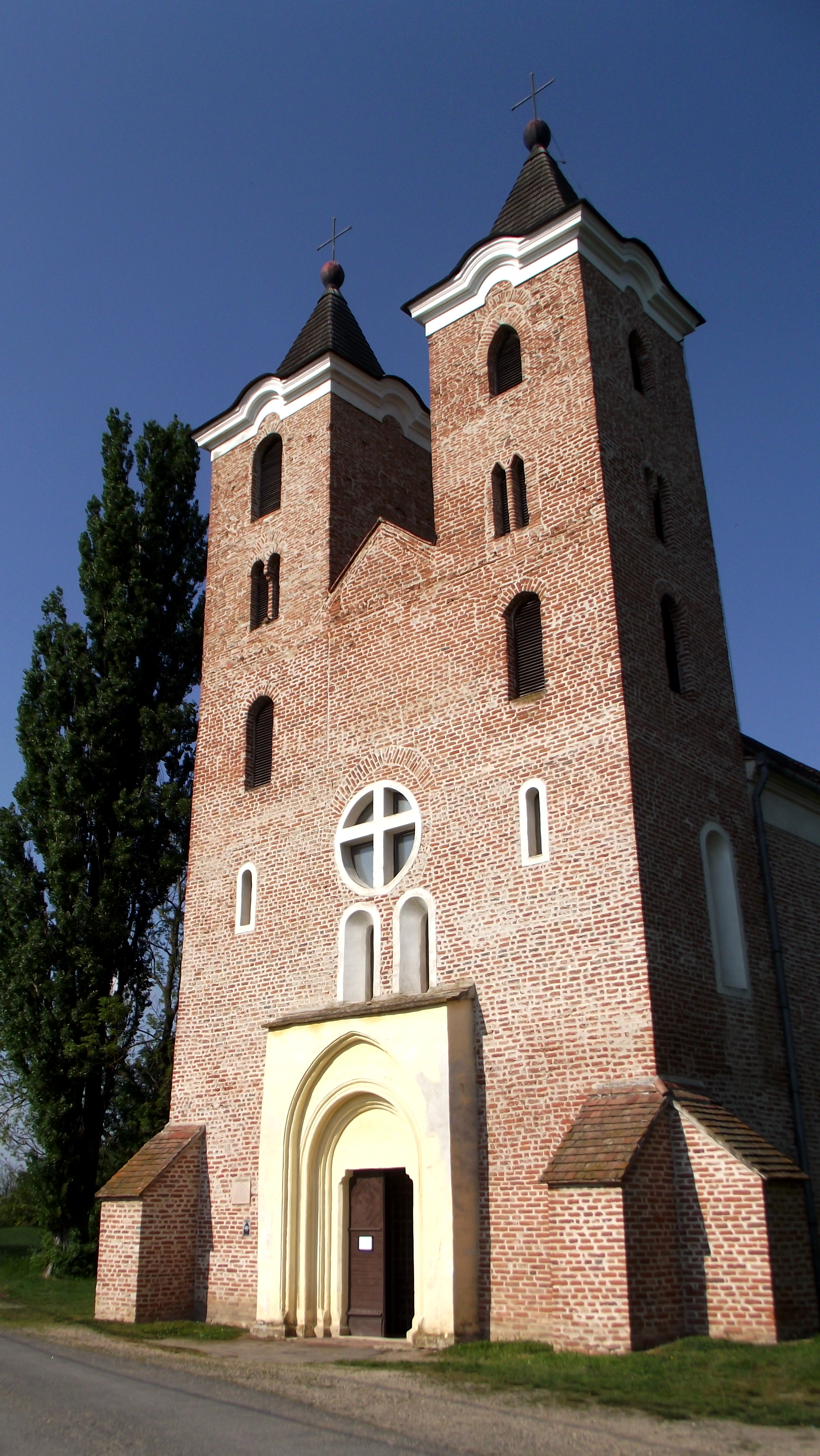 A Szent Jakab apostol templom főhomlokzata 2014 tavaszán.